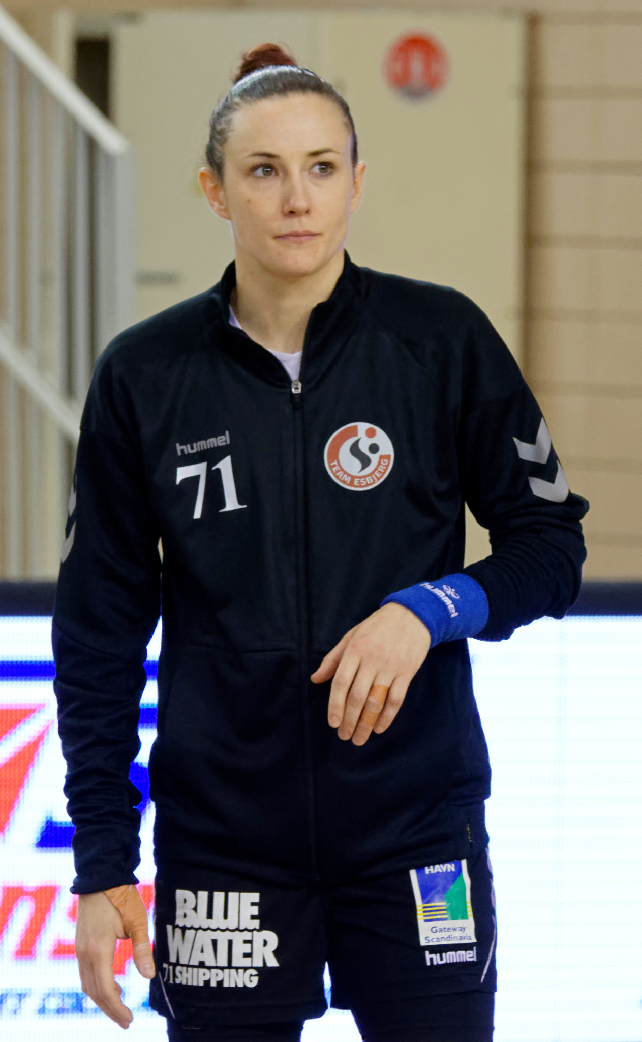 Lors de la rencontre du 3e tour de la Coupe EHF entre Paris 92 et les danoises de Team Esbjerg. A Issy les moulineaux, le 18 novembre 2018.